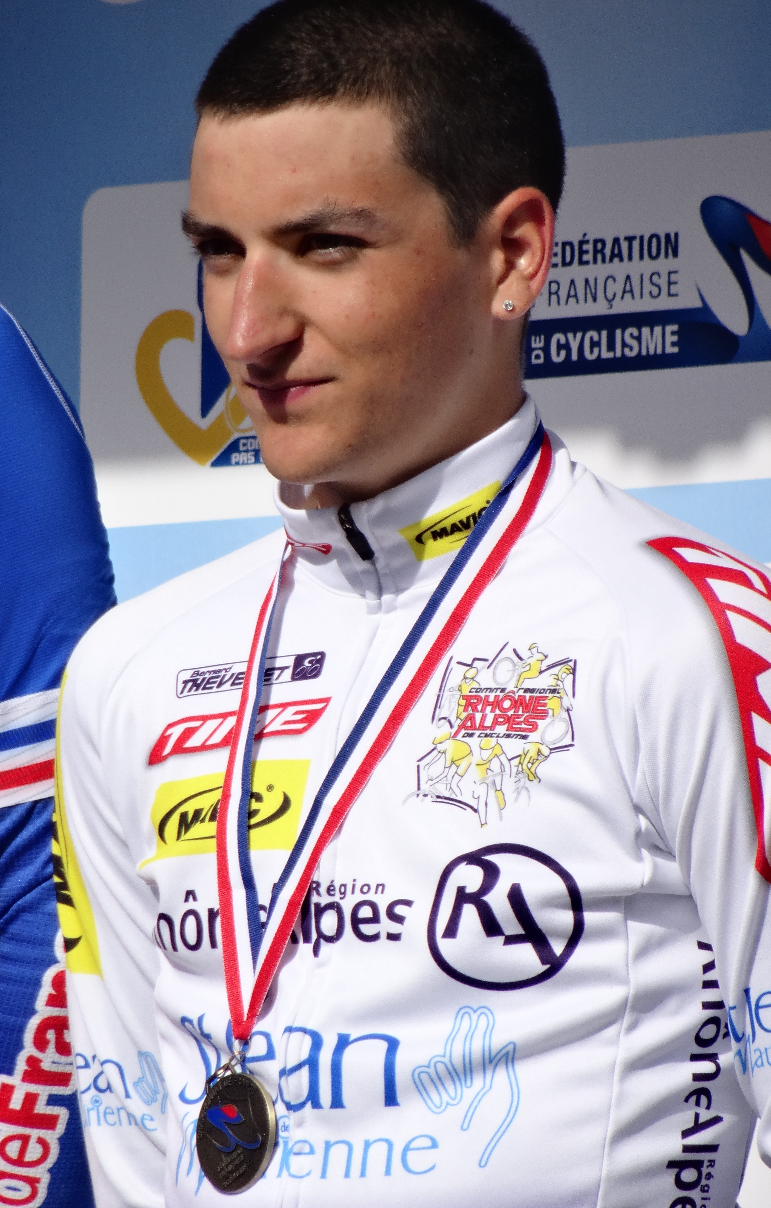 Reportage photographique réalisé le jeudi 21 août à l'occasion des Championnats de France de cyclisme sur route 2014 à Saint-Omer, Pas-de-Calais, Nord-Pas-de-Calais, France. La série A concerne le championnat de France du contre-la-montre juniors hommes, la série B le championnat de France du contre-la-montre espoirs hommes, la série C la remise des prix aux juniors hommes et la série D la remise des prix aux espoirs hommes. Depicted person: Nans Peters